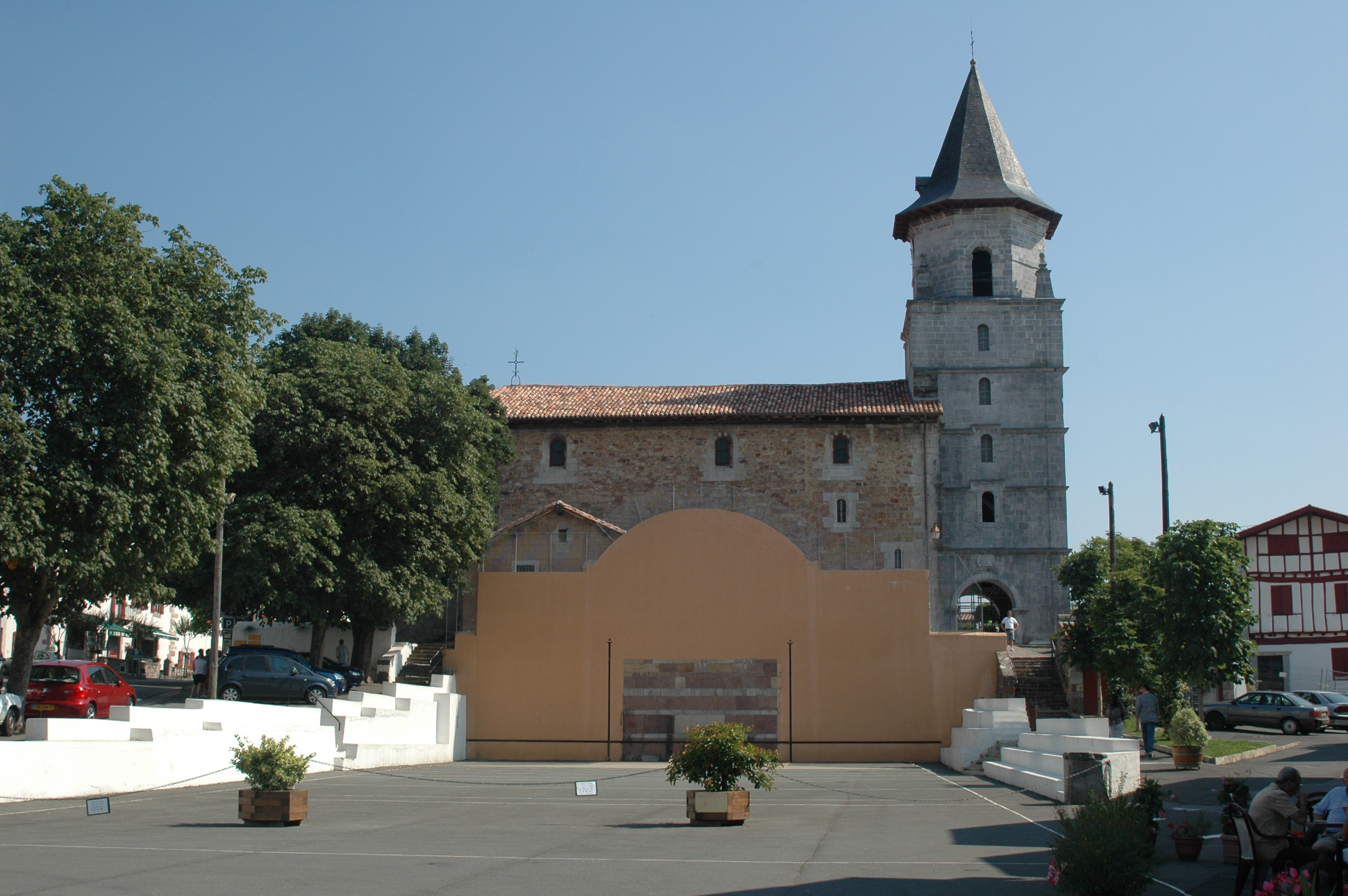 Vue de l'eglise d'Ainhoa et du fronton, prise le 08/07/2006 par Harrieta171